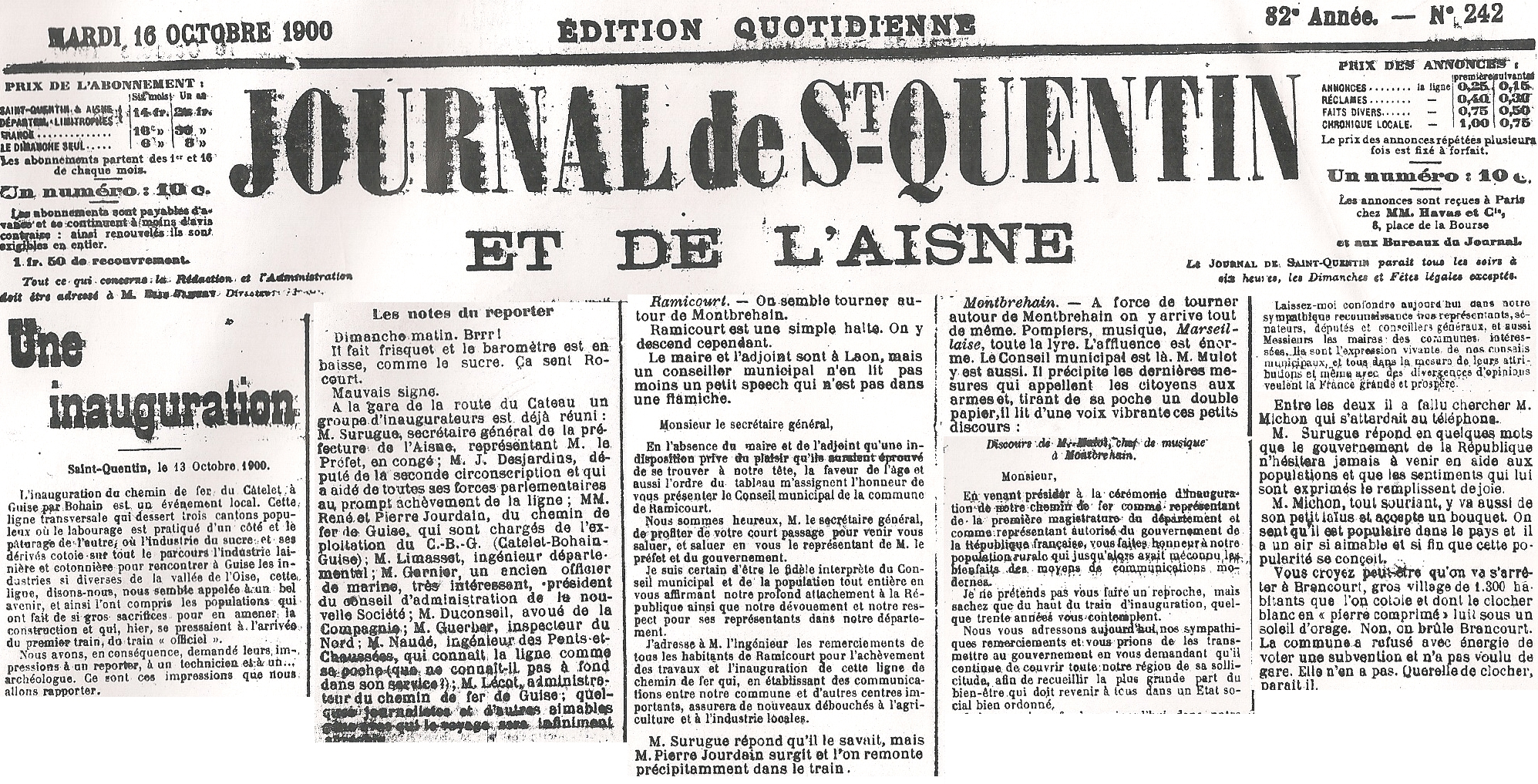 Inauguration de la ligne 1900.